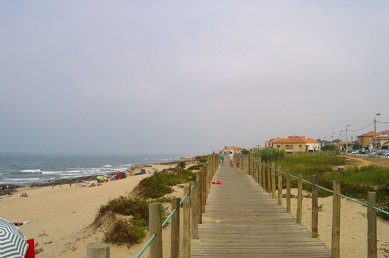 Granja